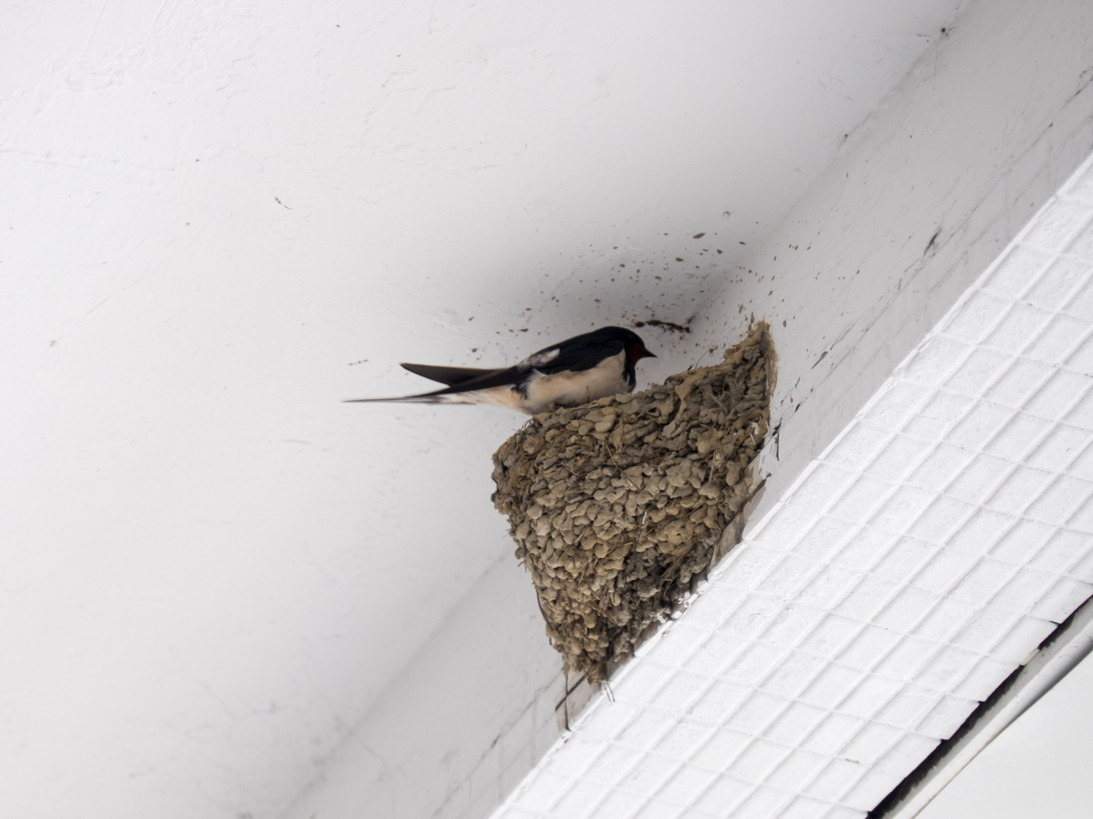 春回新掃舊巢痕，臺北民生郵局一樓入口屋簷下，檢視老窩的家燕。